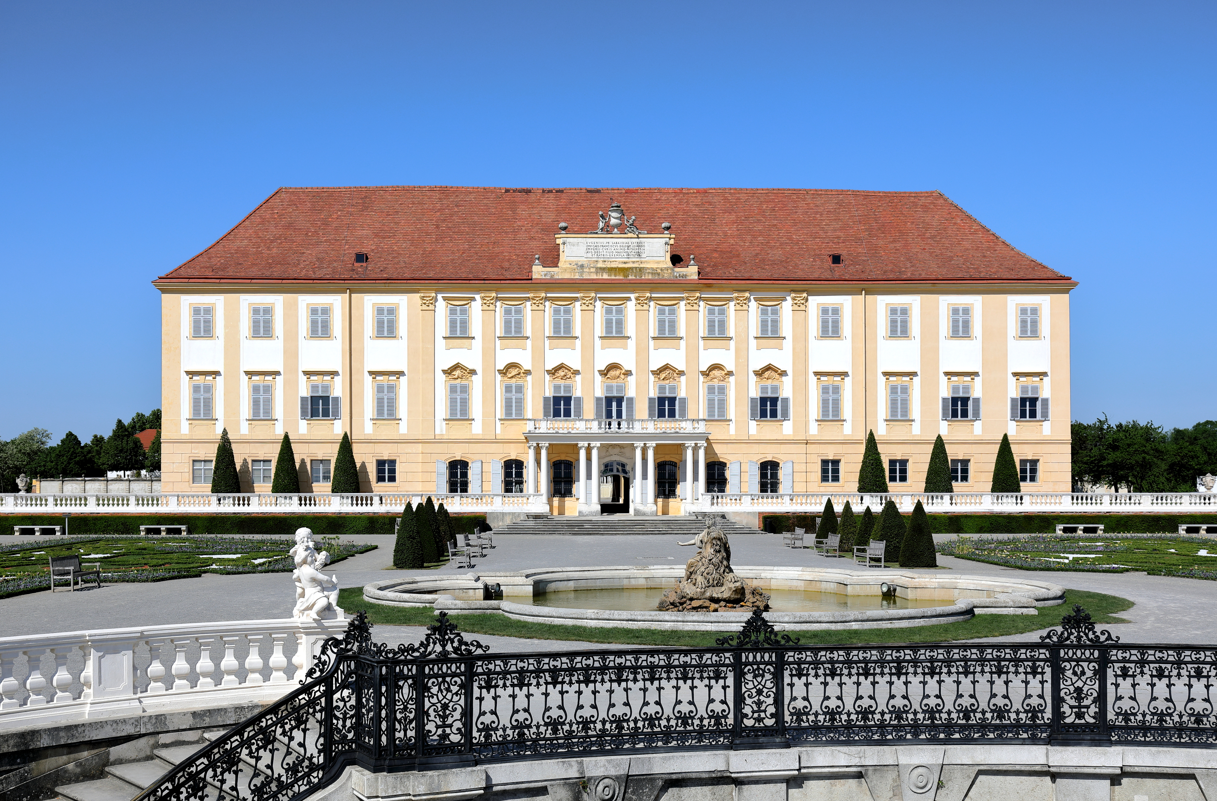 Die Hauptfassade bzw. der Osttrakt des Schlosses der Schlossanlage Schloss Hof in der niederösterreichischen Marktgemeinde Engelhartstetten.Die Schlossanlage wurde um 1627 auf einer Geländekante und östlich der mittelalterlichen Feste Hof errichtet. Nachdem 1725 Prinz Eugen die Anlage erworben hatte, baute er diese zu einem repräsentativen Landsitz aus. 1755 kam das Schloss in den Besitz von Maria Theresia. Von 1773 bis 1775 erfolgte dann ein Um- und Ausbau zum heutigen Erscheinungsbild durch Franz Anton Hillebrandt.